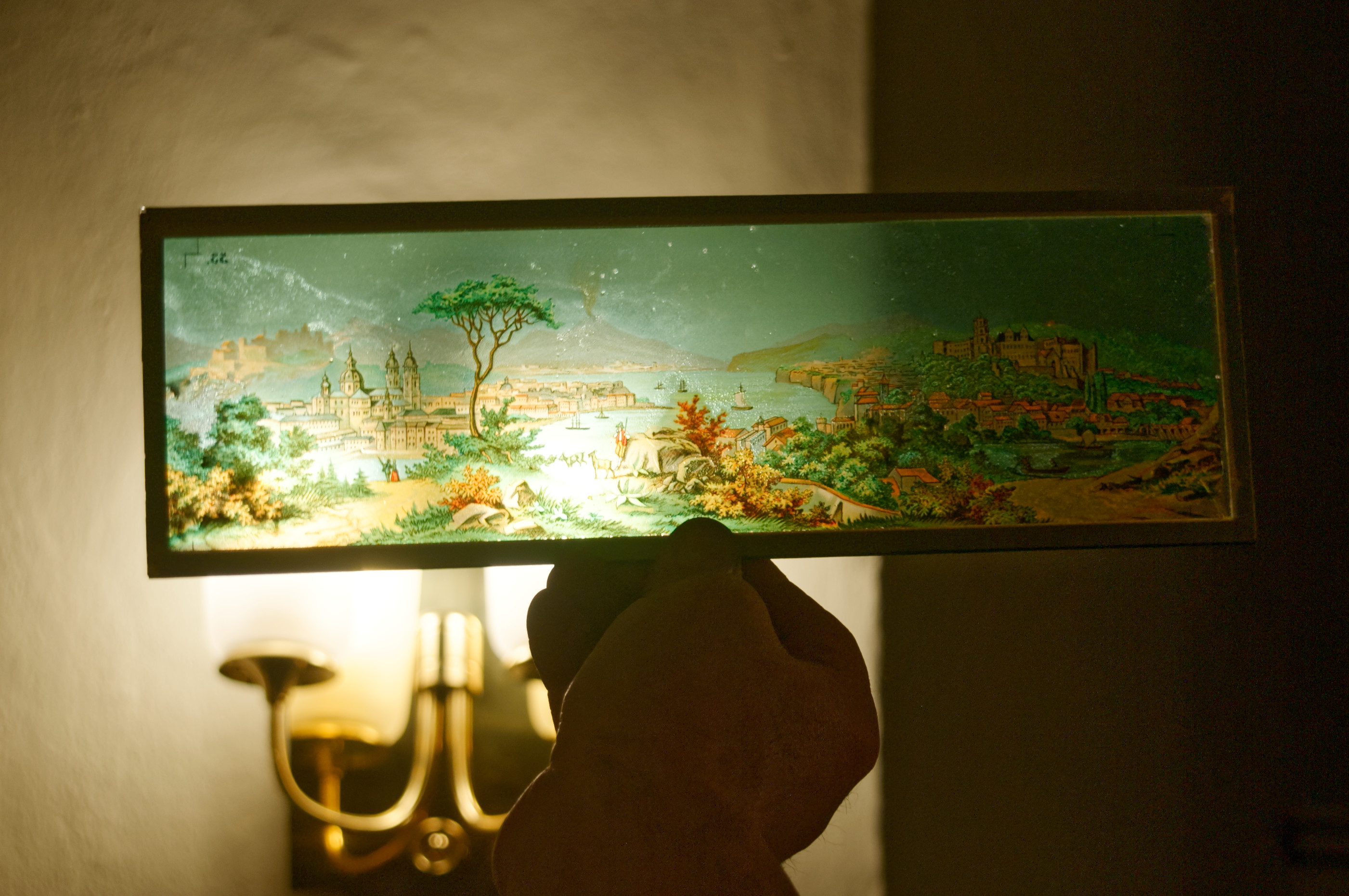 Sauerlandstammtisch Neuenrade. Bildtafel für die Laterna Magica.